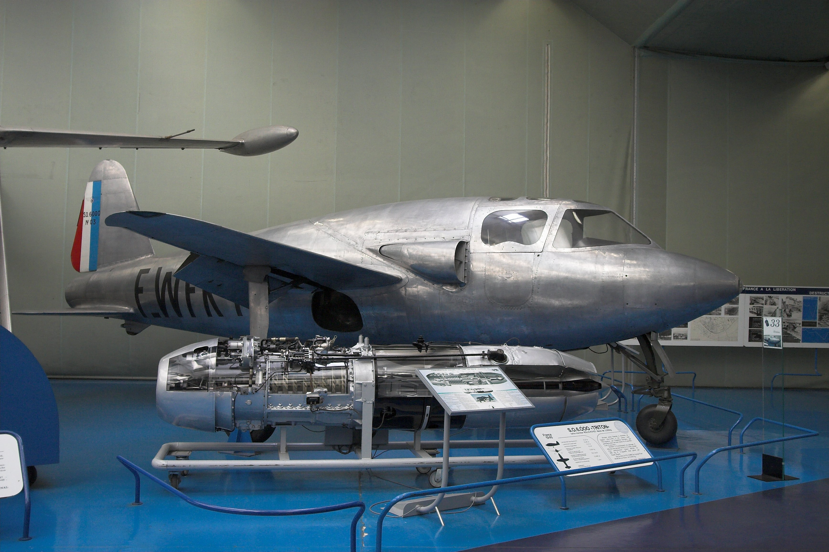 French experimental jet aircraft SO.6000 "Triton" (Musée de l'air et de l'espace, Le Bourget, France)